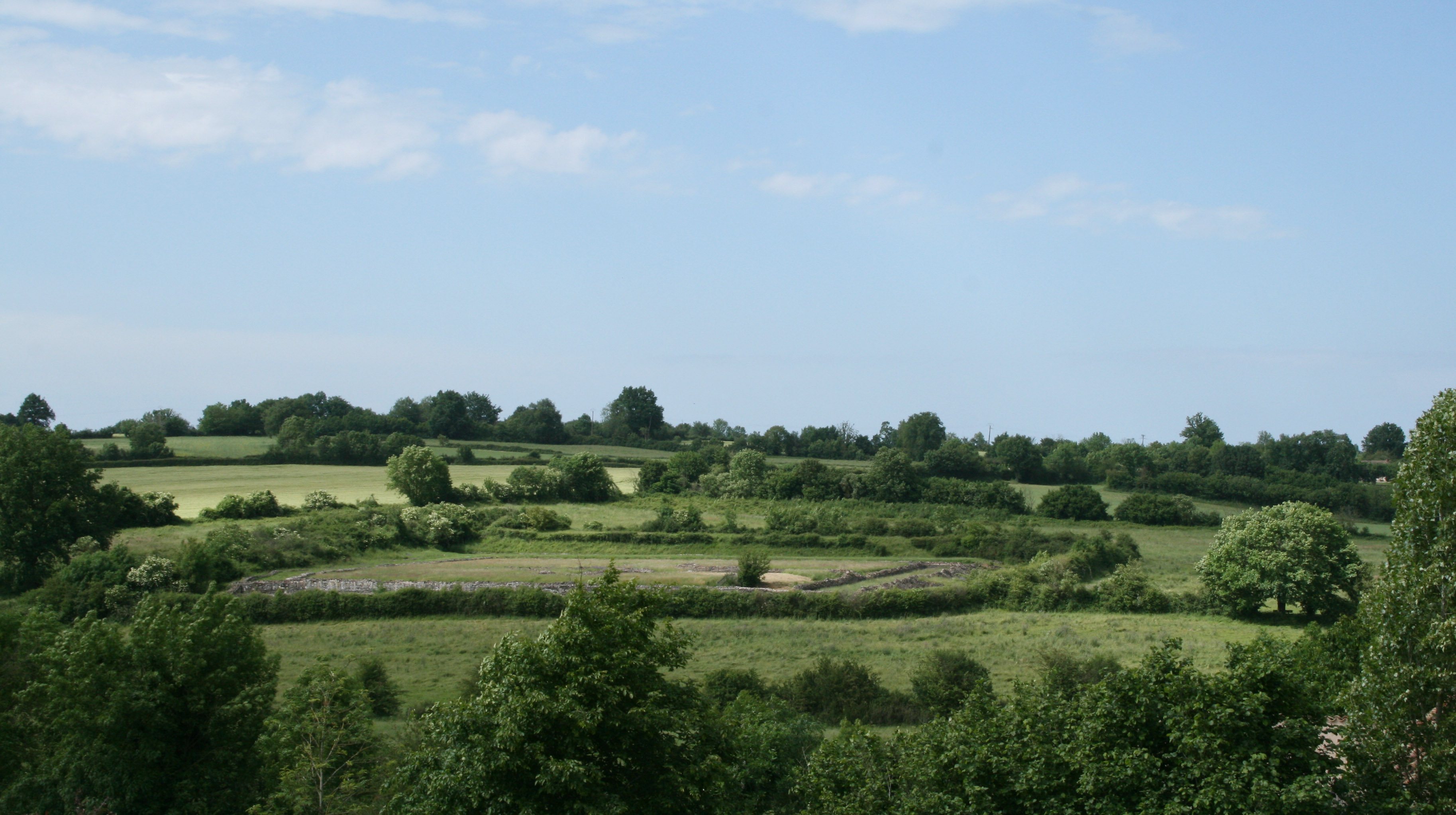 Temple romain à Sanxay